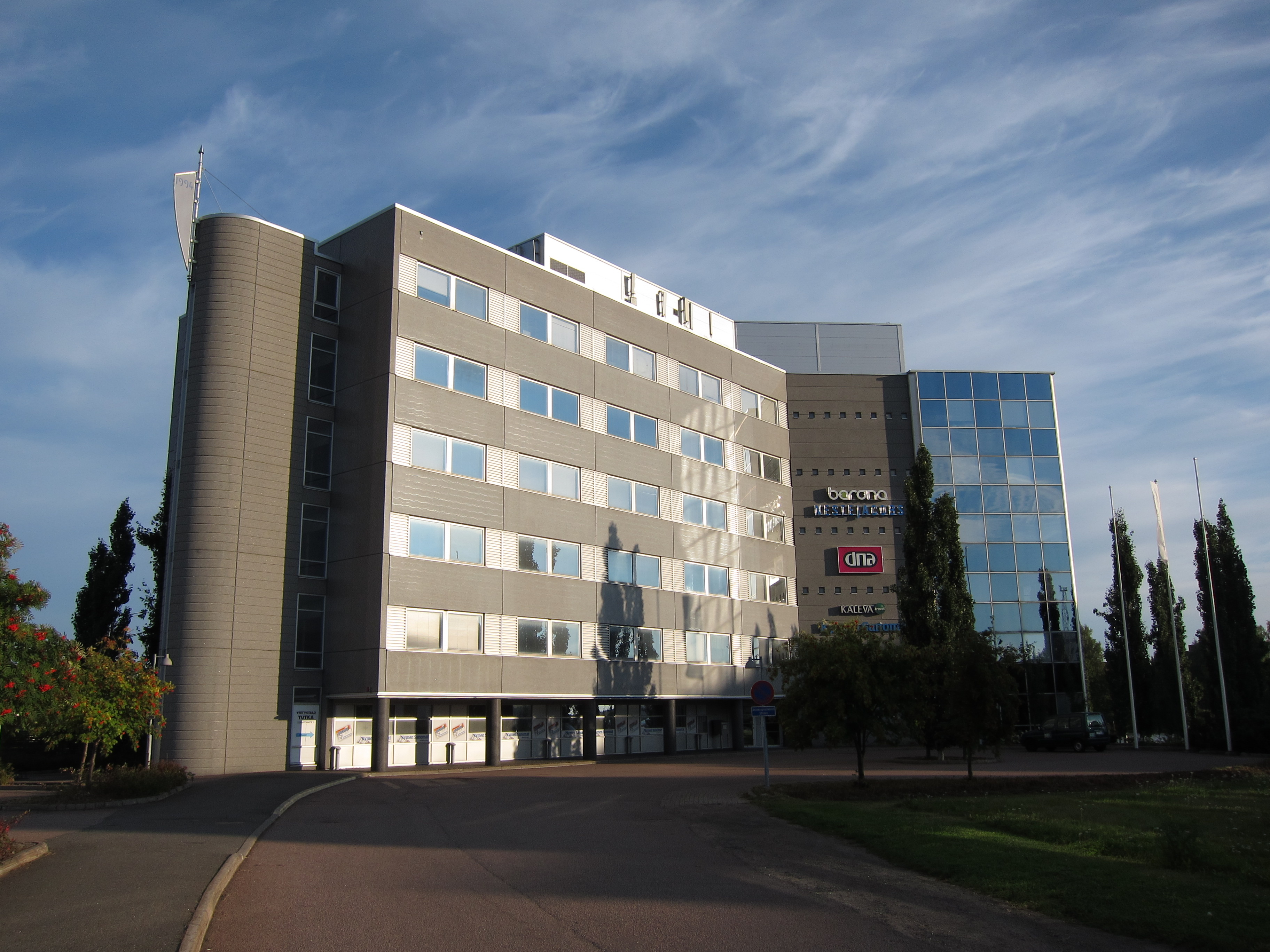 Vuonna 1994 valmistunut Yritystalo Tutka Kotkassa Kotkansaarella osoitteessa Tornatorintie 3. Rakennuksessa toimivia yrityksiä on muun muassa Kymen Sanomat.